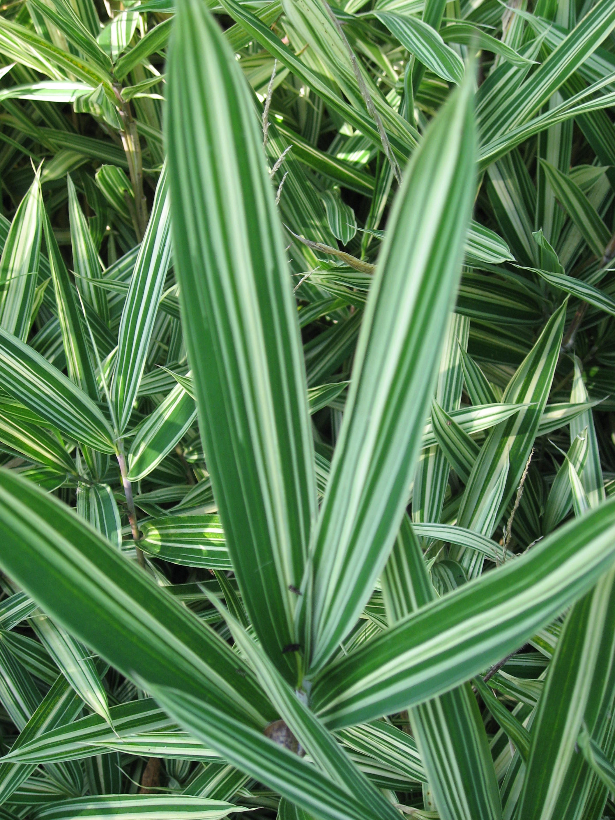 Arundinaria fortunei (Syn. Arundinaria variegata) in Arboretum de La Roche-Guyon Map: 49° 5' 56" N 1° 38' 23" E